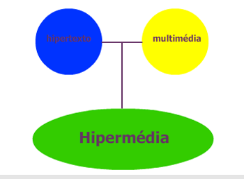 Hipermédia